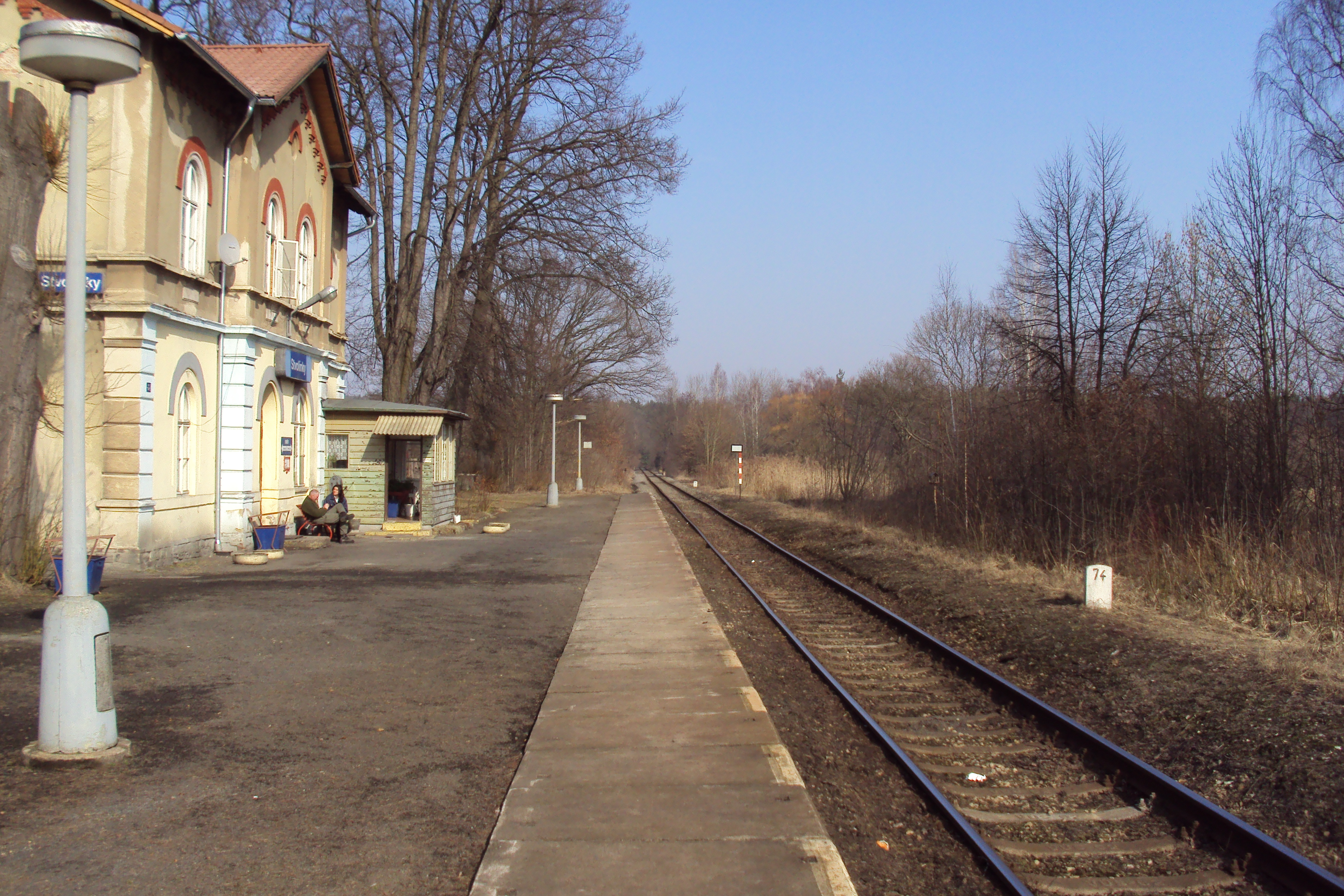 Železniční zastávka Stvolínky na Českolipsku